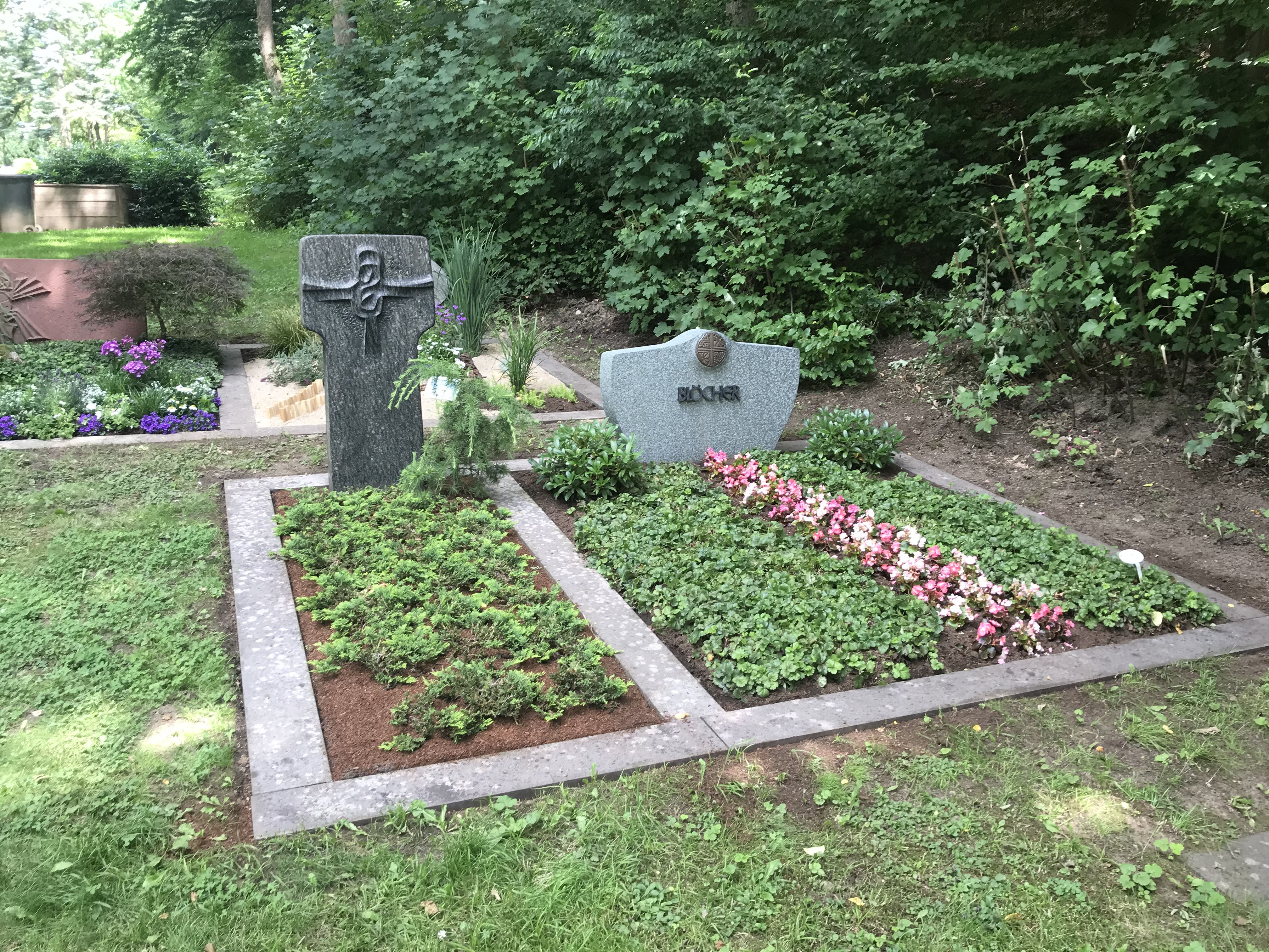 Doppel- und Einzelgrab